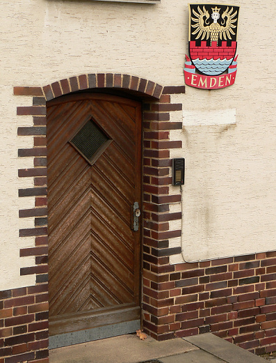 Eingang Unterkunftsgebäude LPSN NI